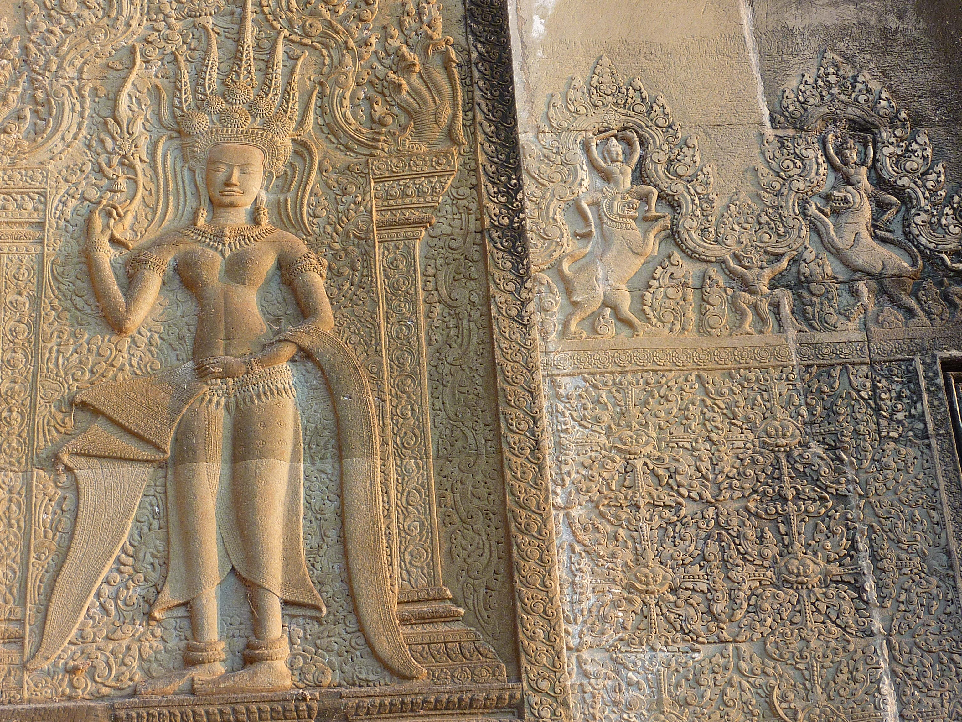 047 Apsaras at Angkor Wat Photograph from Angkor Wat in Cambodia taken by Anandajoti.